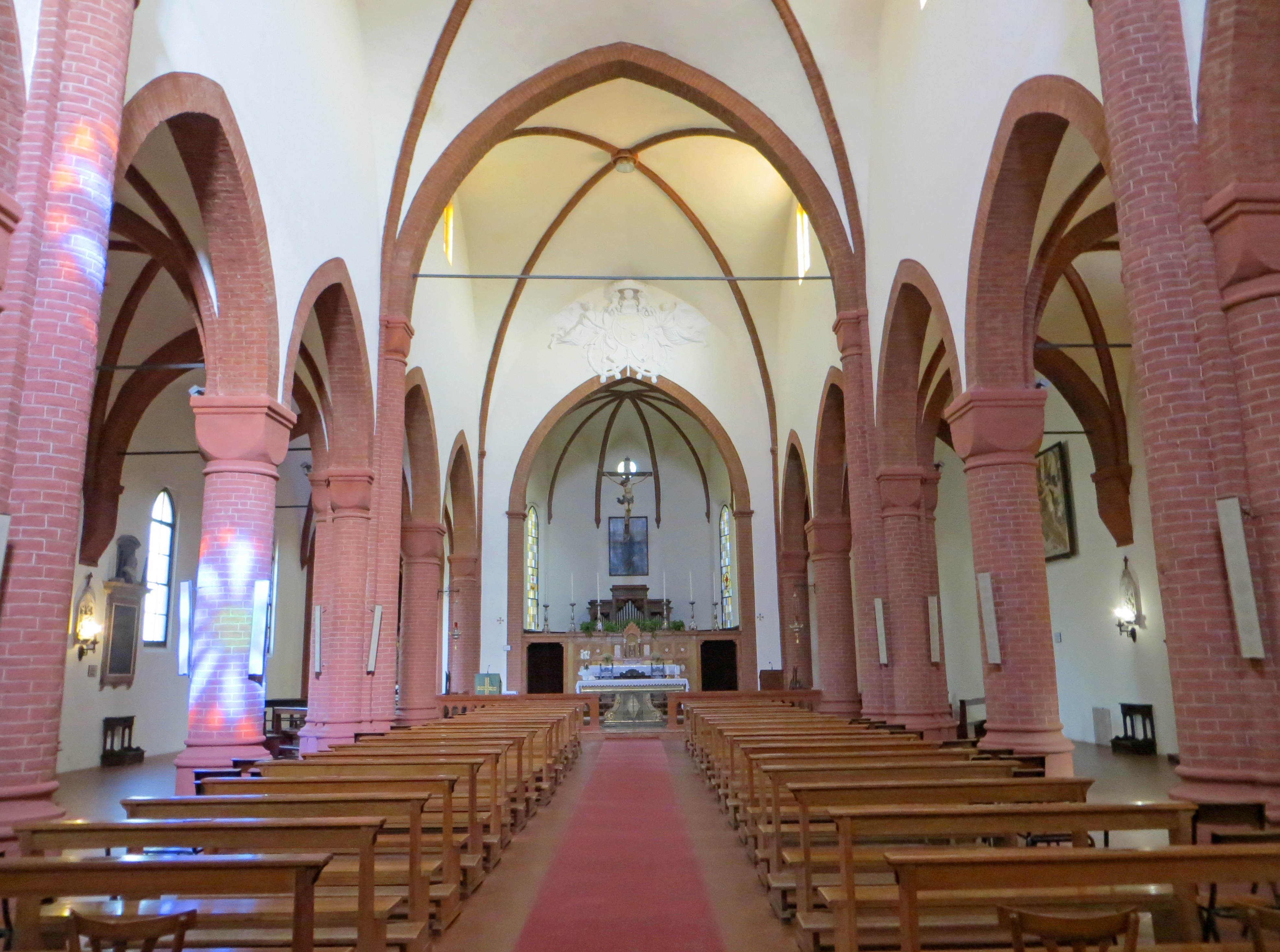 Chiesa di Santa Maria degli Angeli (Busseto) - navata centrale